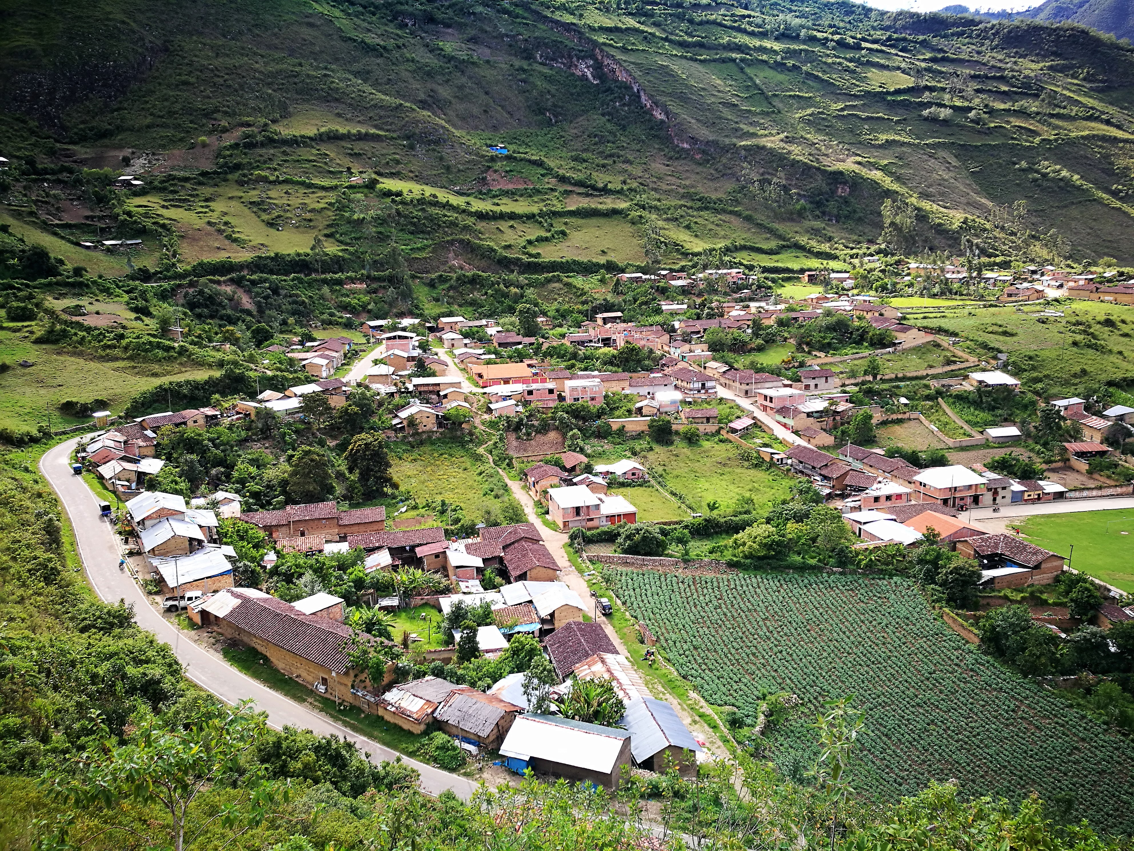 Vista de Leimebamba des de dalt, de camí al Museu